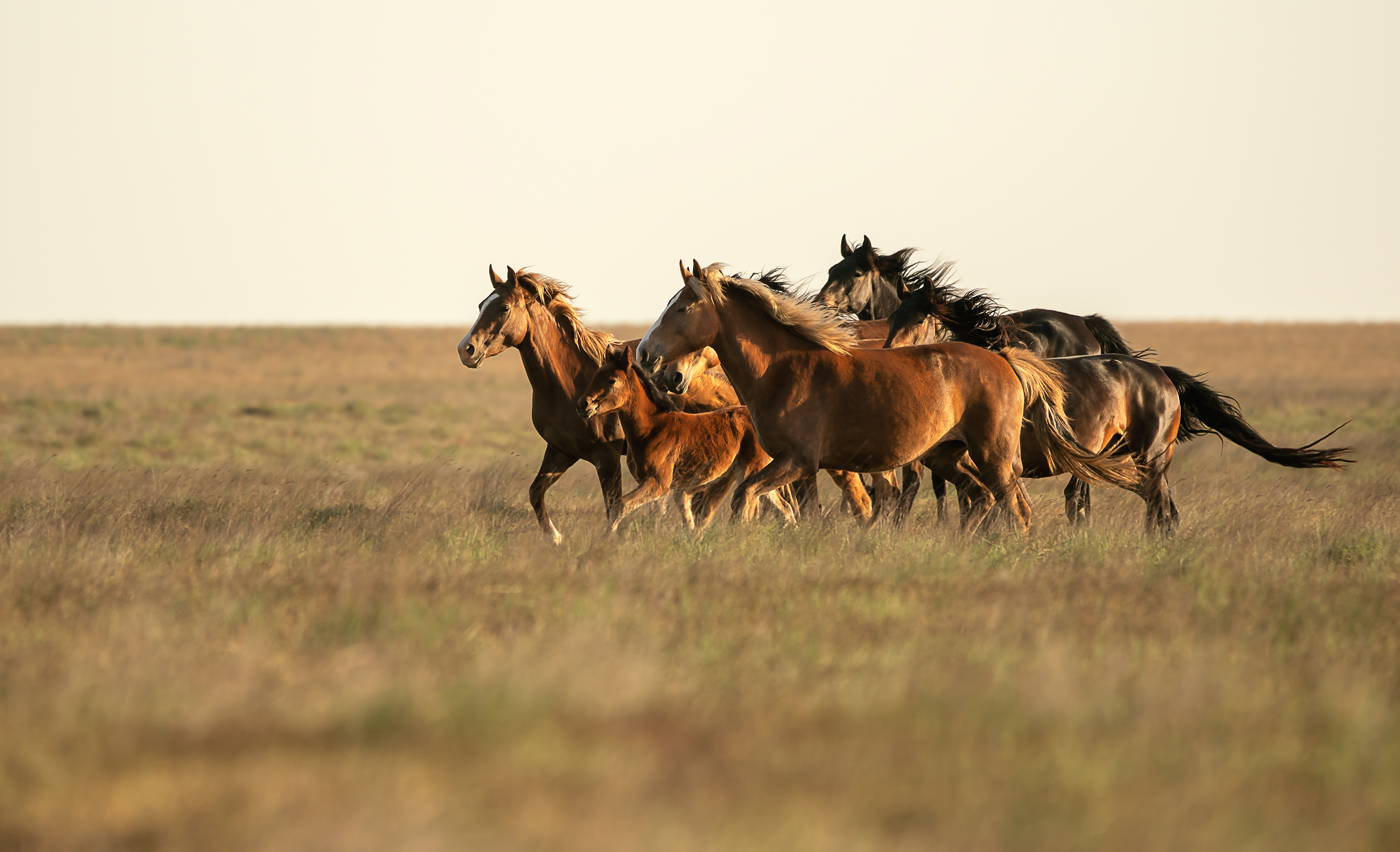 Чёрные земли: Основной участок заповедника расположен на Прикаспийской низменности, между низовьями рр. Кума и Волга, на территории Яшкульского и Черноземельского районов Республики Калмыкия. Почти весь он находится ниже уровня моря. Участок "Озеро Маныч Гудило" находится в центральной части Кума-Манычской впадины, на берегах одноименного озера, в Яшалтинском и Приютненском районах Республики Калмыкия, в непосредственной близости от Ростовского заповедника, Черноземельский район, Калмыкия This image is related to the protected area of Russia number 0800027